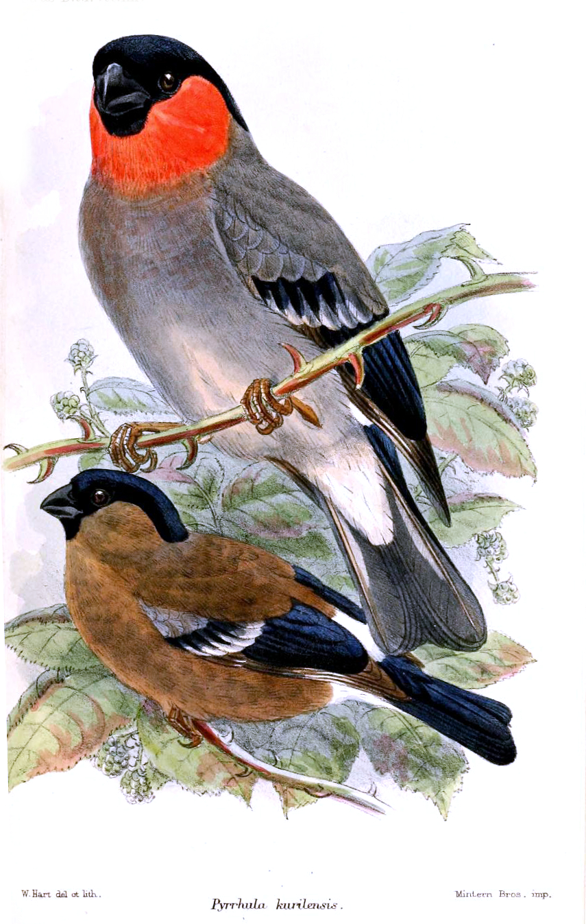 Pyrrhula kurilensis = Pyrrhula pyrrhula griseiventris, Ussuri Bullfinch